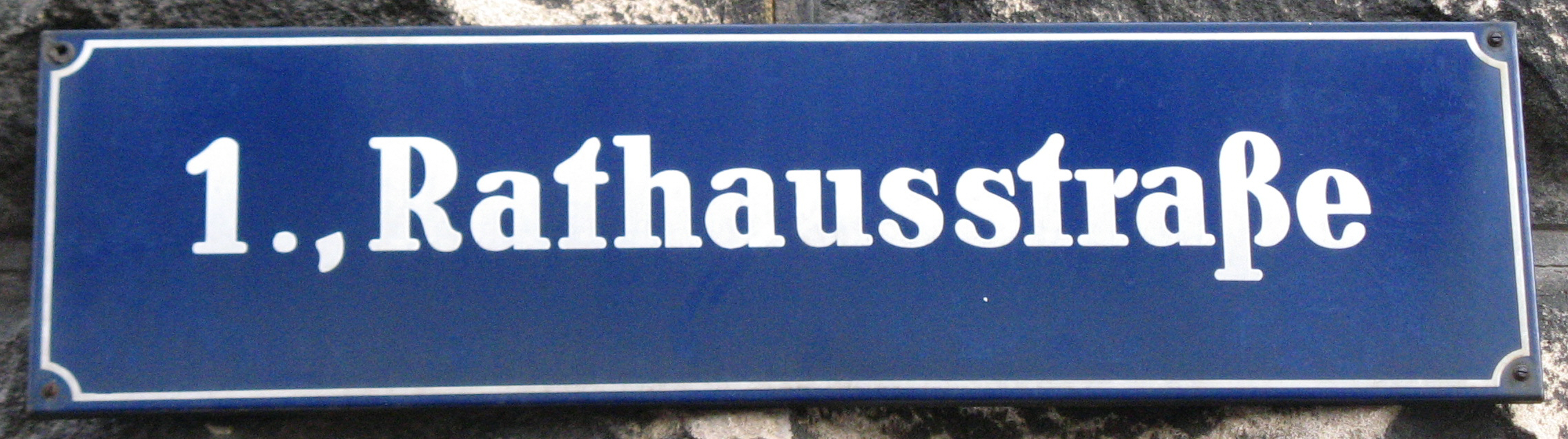 Straßenschild, Rathausstraße, Wien-Innere Stadt